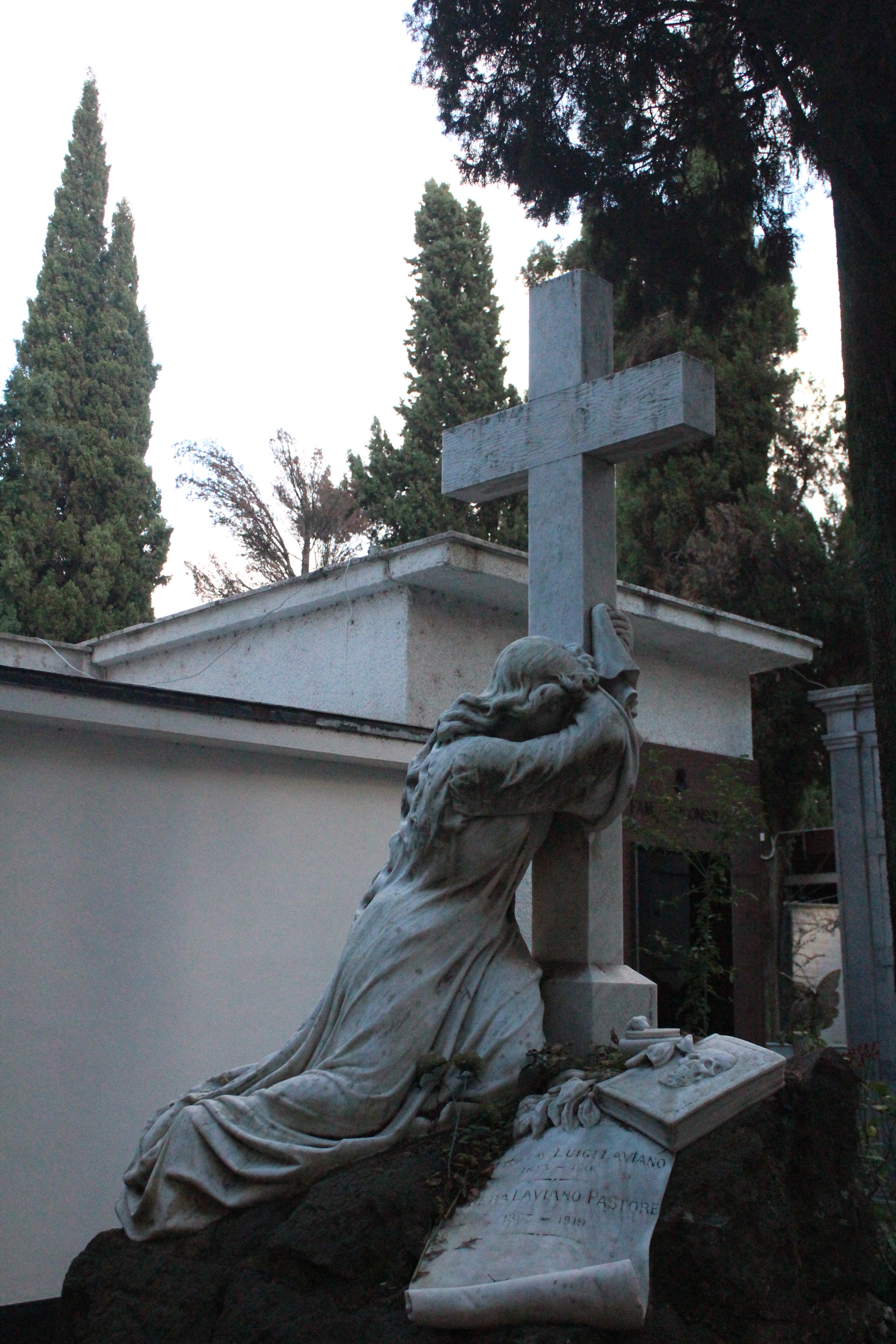 Il monumento funebre rappresenta una giovane donna addolorata. Presenta una lunga cascata di capelli ricci, tipici delle statue di Sartorio, visibili anche in altre opere. Si aggrappa alla solida croce (sulla quale è riportata la firma dell’autore e del luogo dove si collocava il suo studio) con il capo chino in segno di disperazione, infatti si copre il volto per un momento di riservato dolore. Ricorda la posa giottesca, di Maria Maddalena, nella “Crocifissione di Cristo”, nella cappella degli Scrovegni, a Padova. Indossa un abito molto lungo che, nella parte retrostante, presenta morbidi panneggi e strascico, dalle maniche larghe. A destra del soggetto compaiono: • un serpente che beve in una coppa (simbolo della medicina, infatti il defunto svolgeva la professione di medico); • un libro, sulla cui copertina è raffigurato un teschio, simbolo della morte; • una pergamena, con le iscrizioni dei nomi e delle date di nascita e di morte dei due defunti.